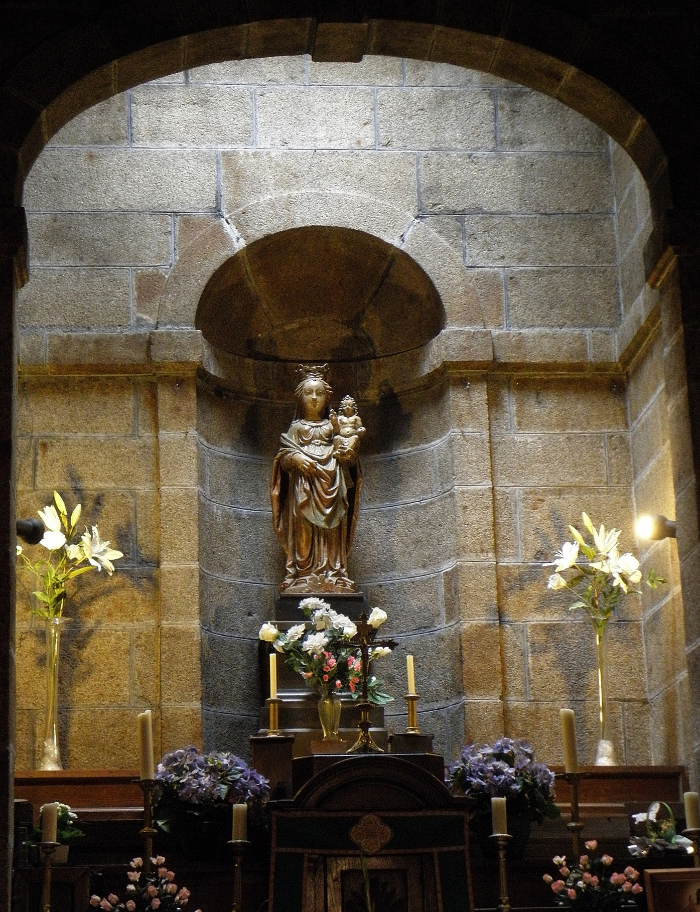 Chapelle Notre-Dame-de-Bon-Secours à Fougères (35). Statue de la Vierge à l'Enfant ayant orné précédemment la Porte Roger.